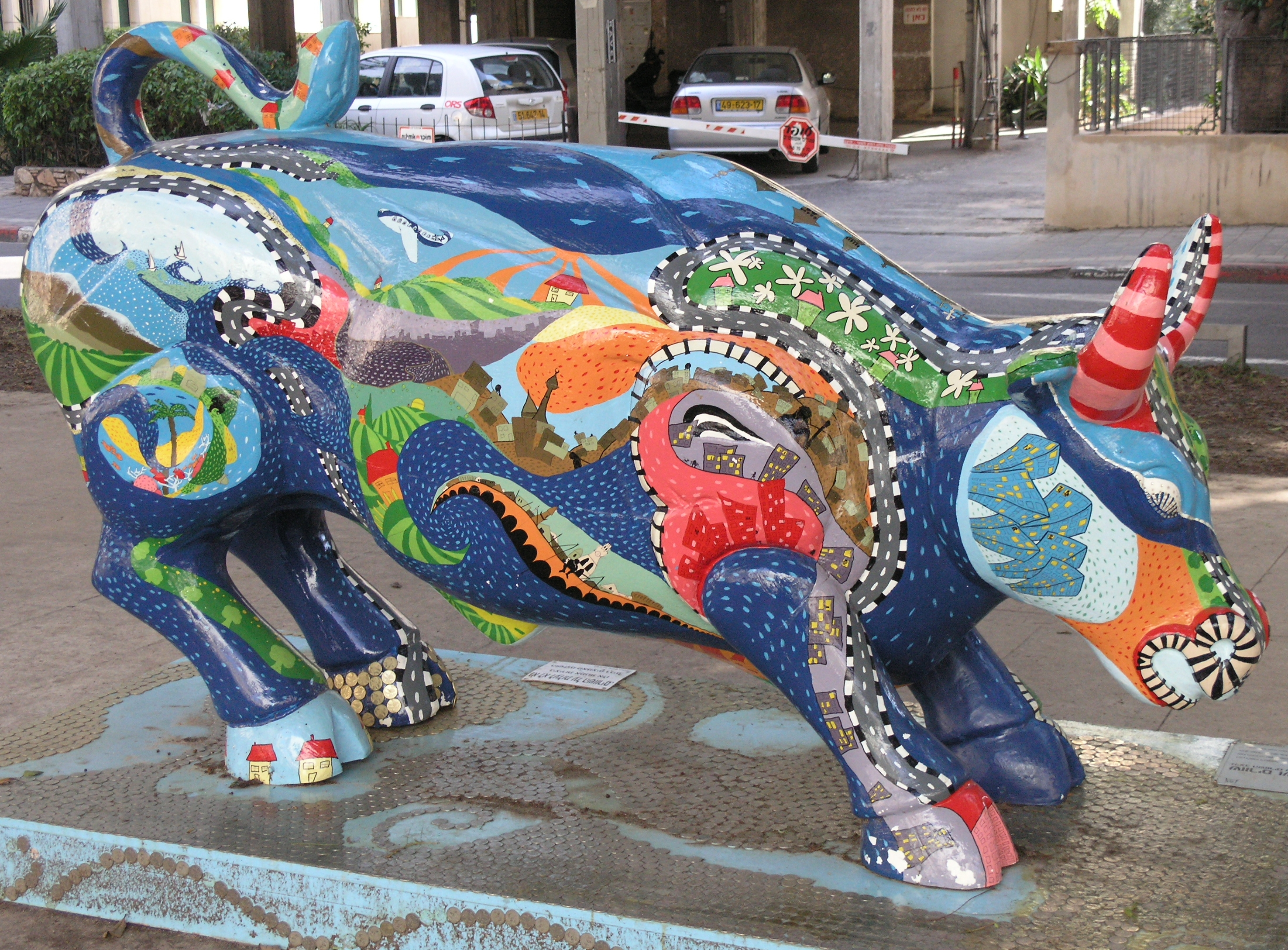 השור של בנק לאומי